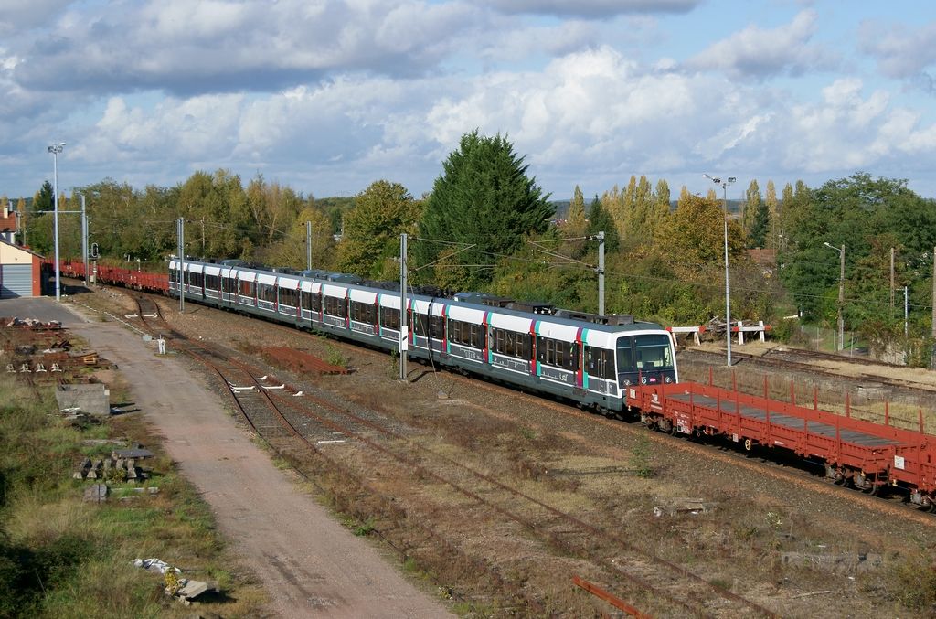 Une Mi79 tout juste rénovée remonte sur Paris dans un train de FRET